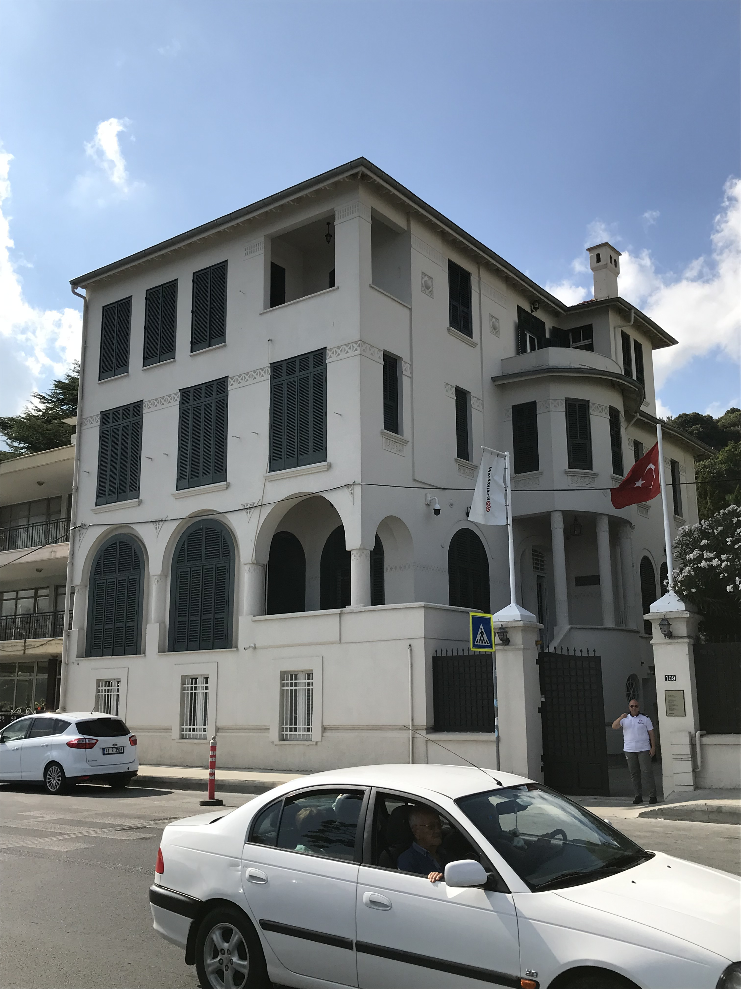 Boğaz kenarında bir yalı, Sarıyer, İstanbul, Türkiye.